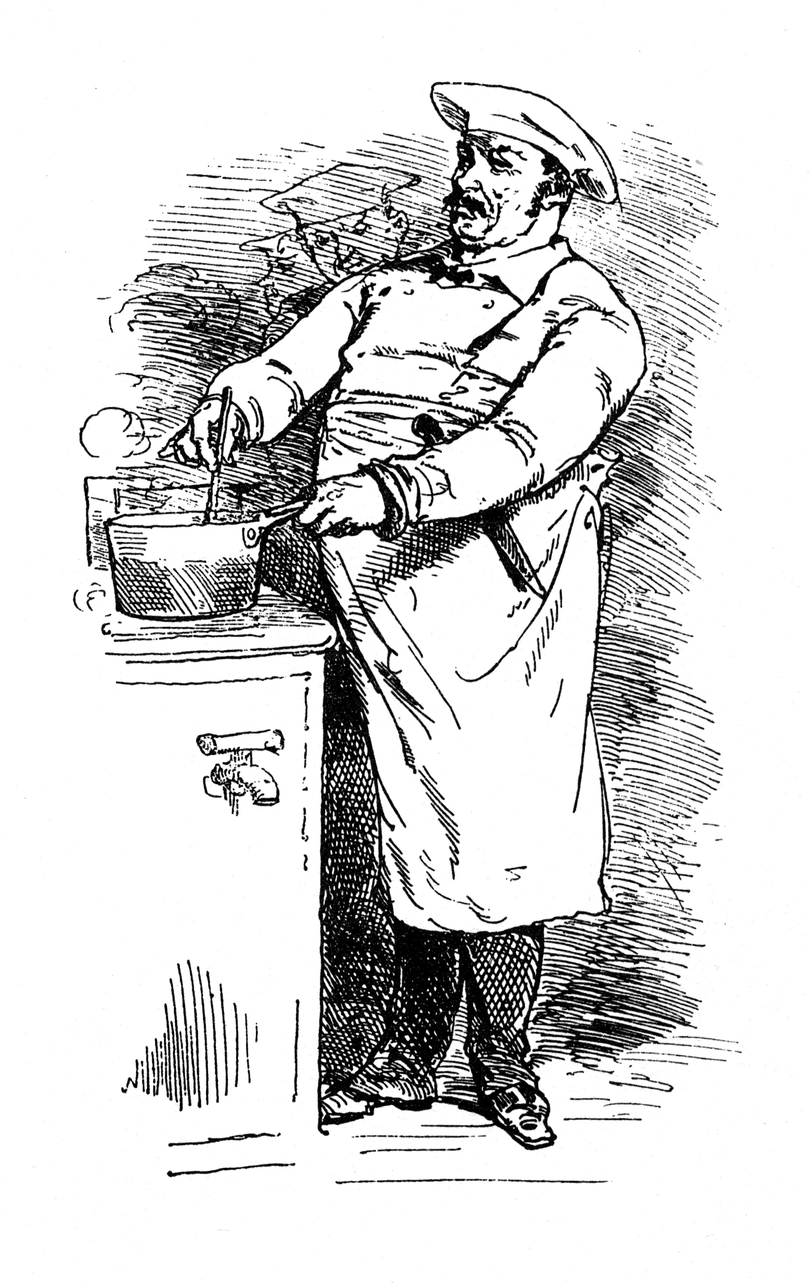 Koch am Herd